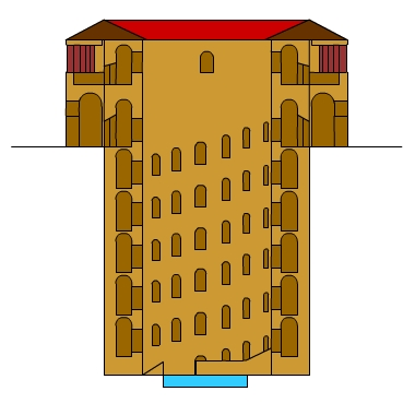 Disegno del Cisternone della Cittadella di Torino basato su un disegno del 1664 di Michelangelo Morello